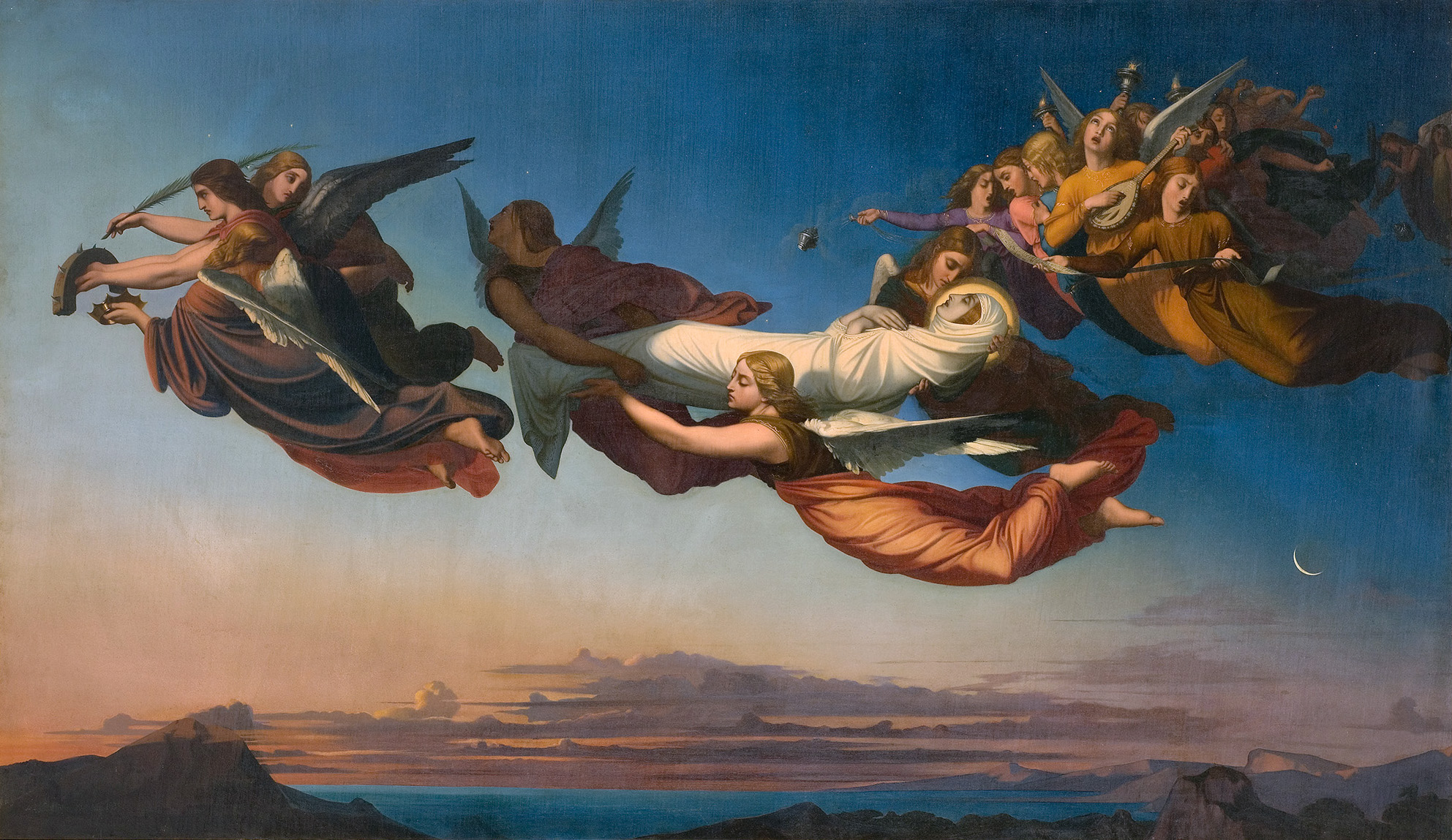 Dans cette composition quasi surnaturelle, Lehmann évoque le transport miraculeux du corps de sainte Catherine, martyrisée pour avoir refusé de s'unir à l'empereur Maximilien.